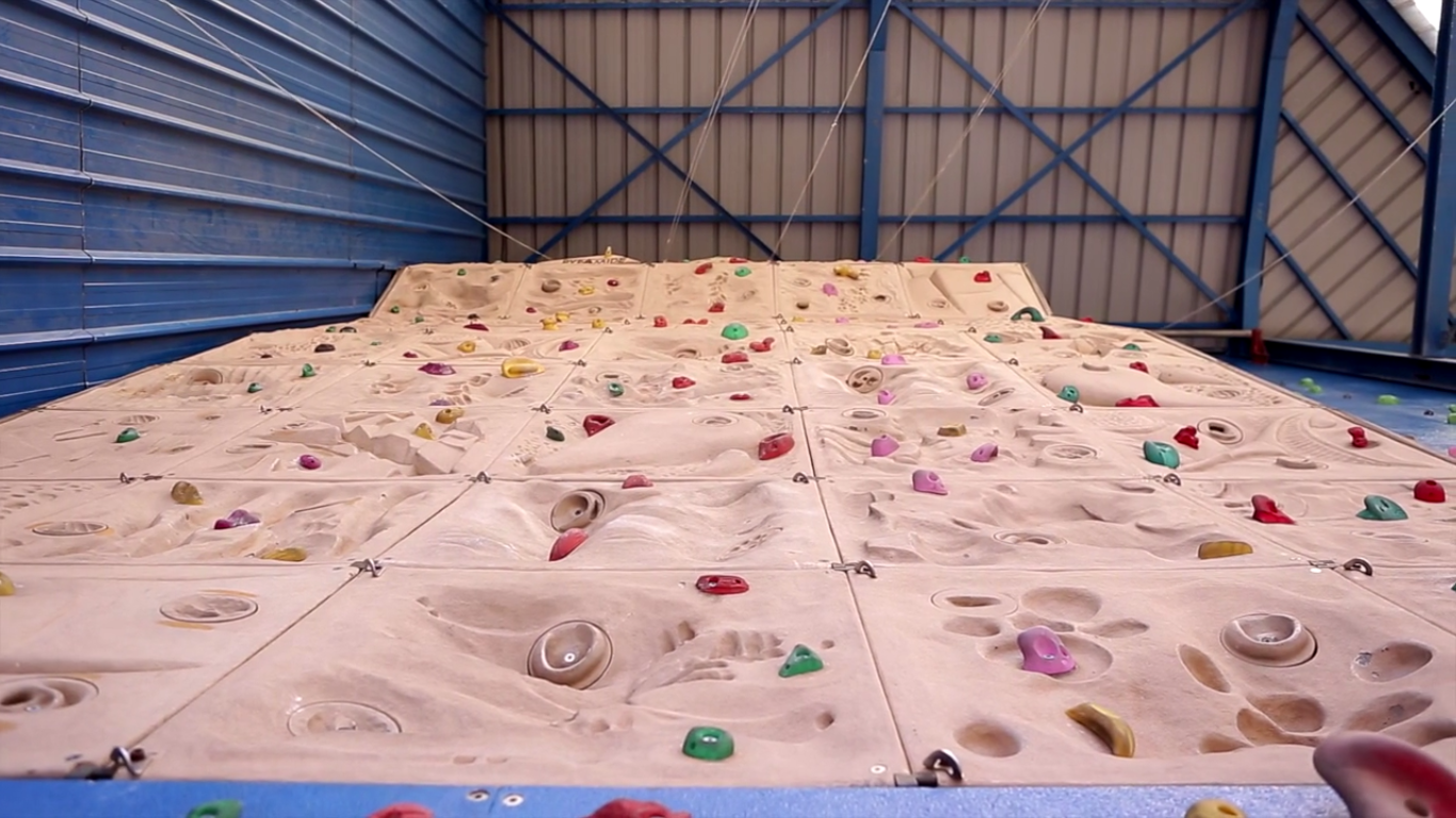 Mur d'escalade n°1